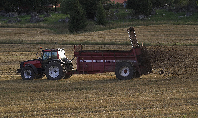 Gödselspridare, Fastgödselspridare JF